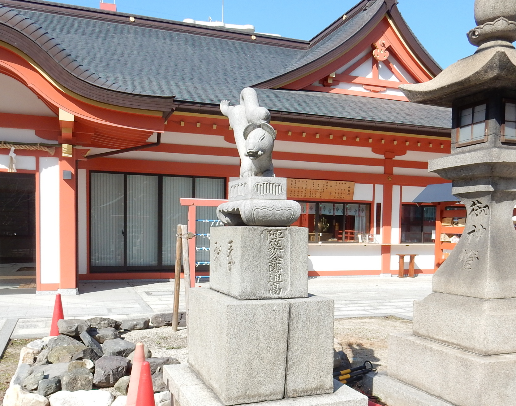 土佐稲荷神社の狛犬